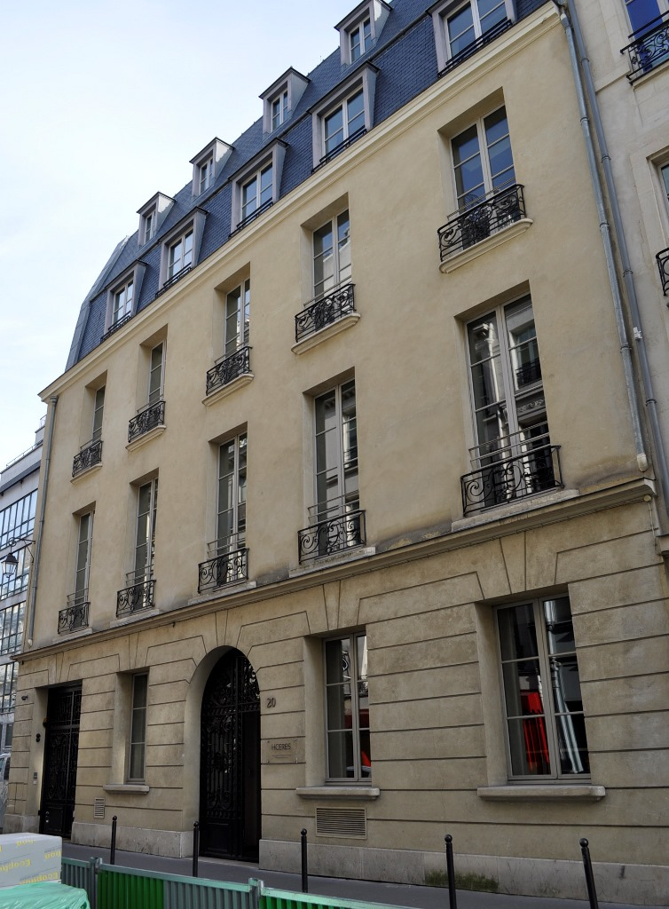 20 rue Vivienne 2eme arrondissement de Paris. Siège de l’Agence d'évaluation de la recherche et de l'enseignement supérieur puis du Haut Conseil de l'évaluation de la recherche et de l'enseignement supérieur jusqu'en mars 2016